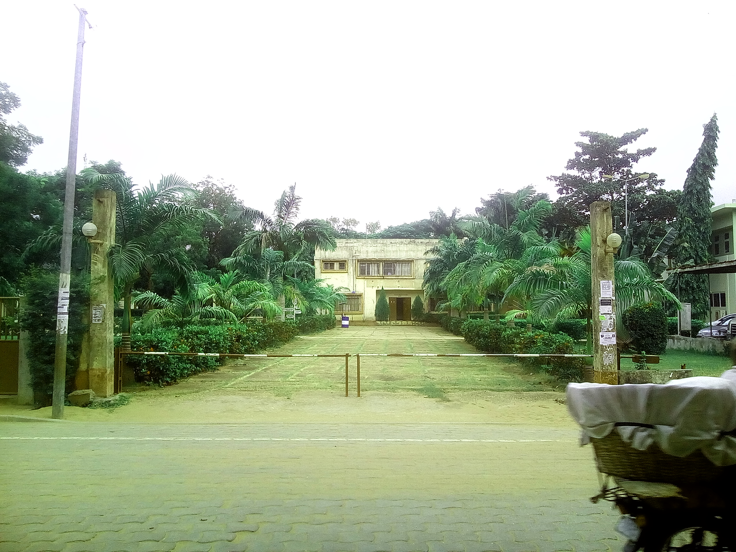 ENAM Bénin